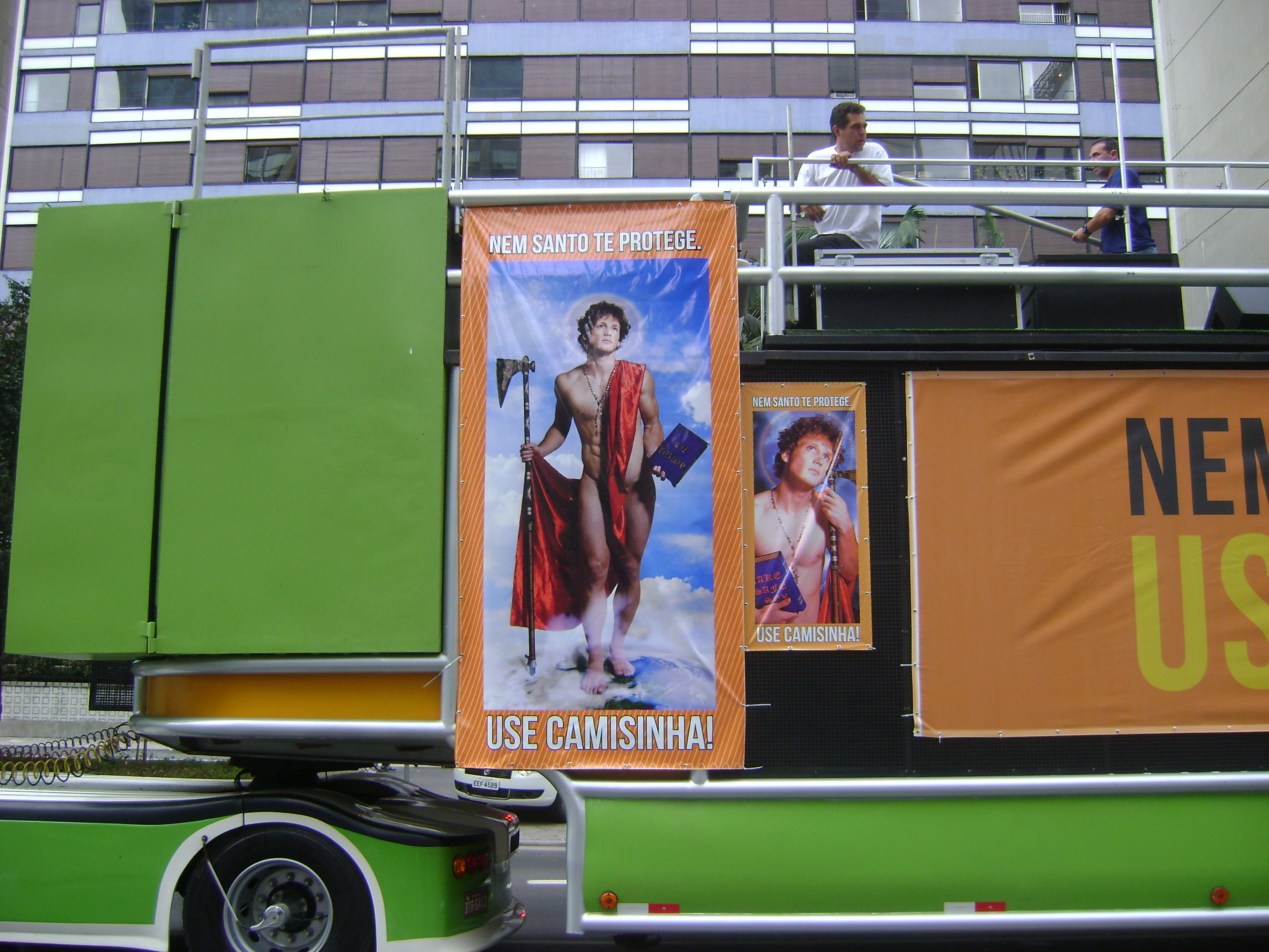 Trio da Parada do Orgulho LGBT de São Paulo com imagem de santo musculoso, usado para incentivar o uso de preservativo, e que gerou protestos da Igreja Católica.